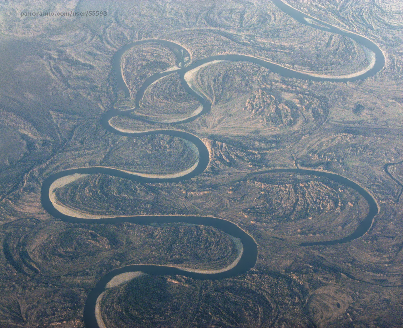 Меандры реки Чулым. Снято сквозь иллюминатор пассажирского самолёта 21 сентября 2011 года. Сибирь, Чулымская равнина, восток Томской области, примерно в 25 км к юго-западу от села Тегульдет. Случайно снятое мною стереоизображение этого участка реки можно увидеть здесь